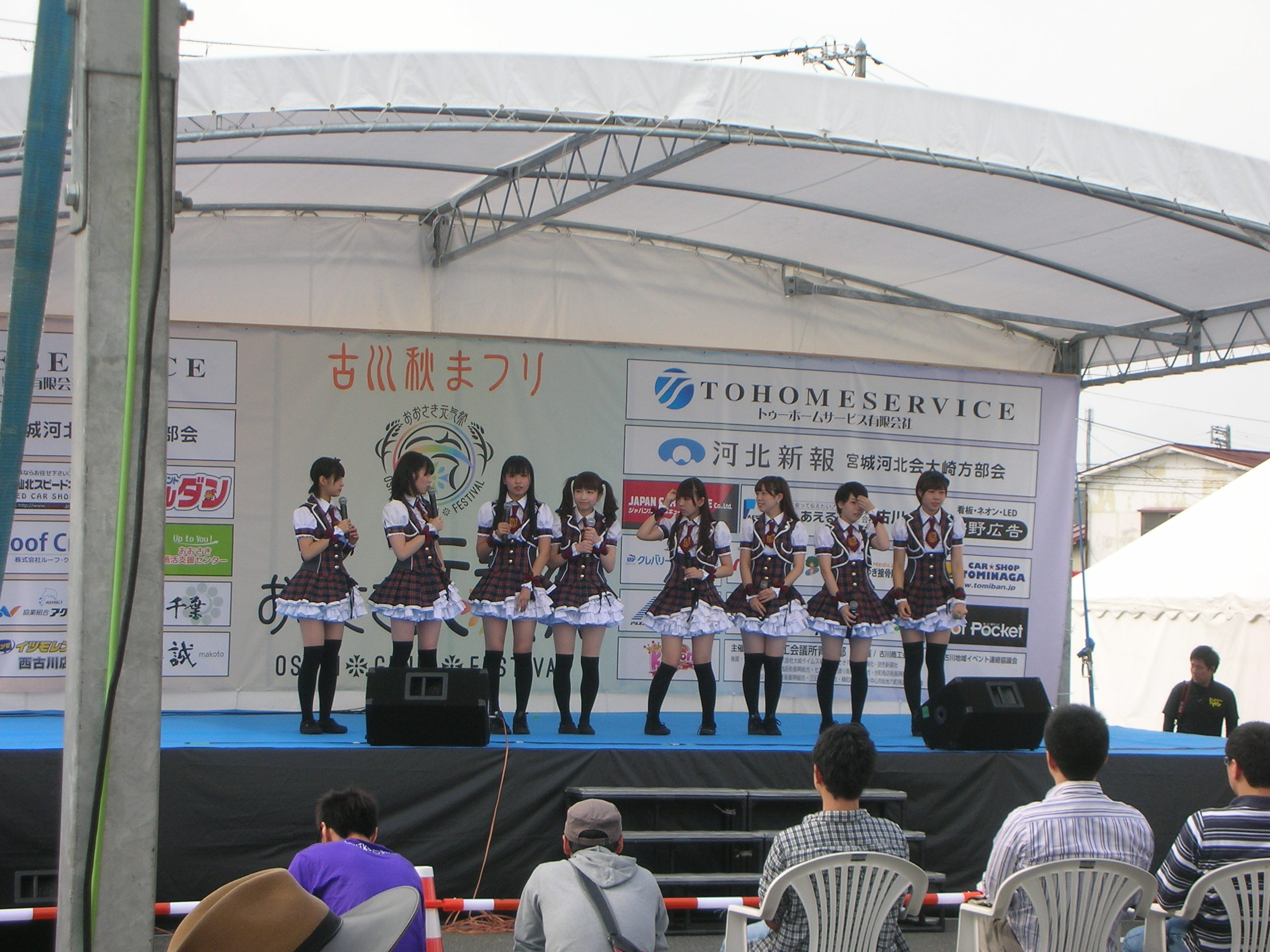 バクステ外神田一丁目 in おおさき元氣祭